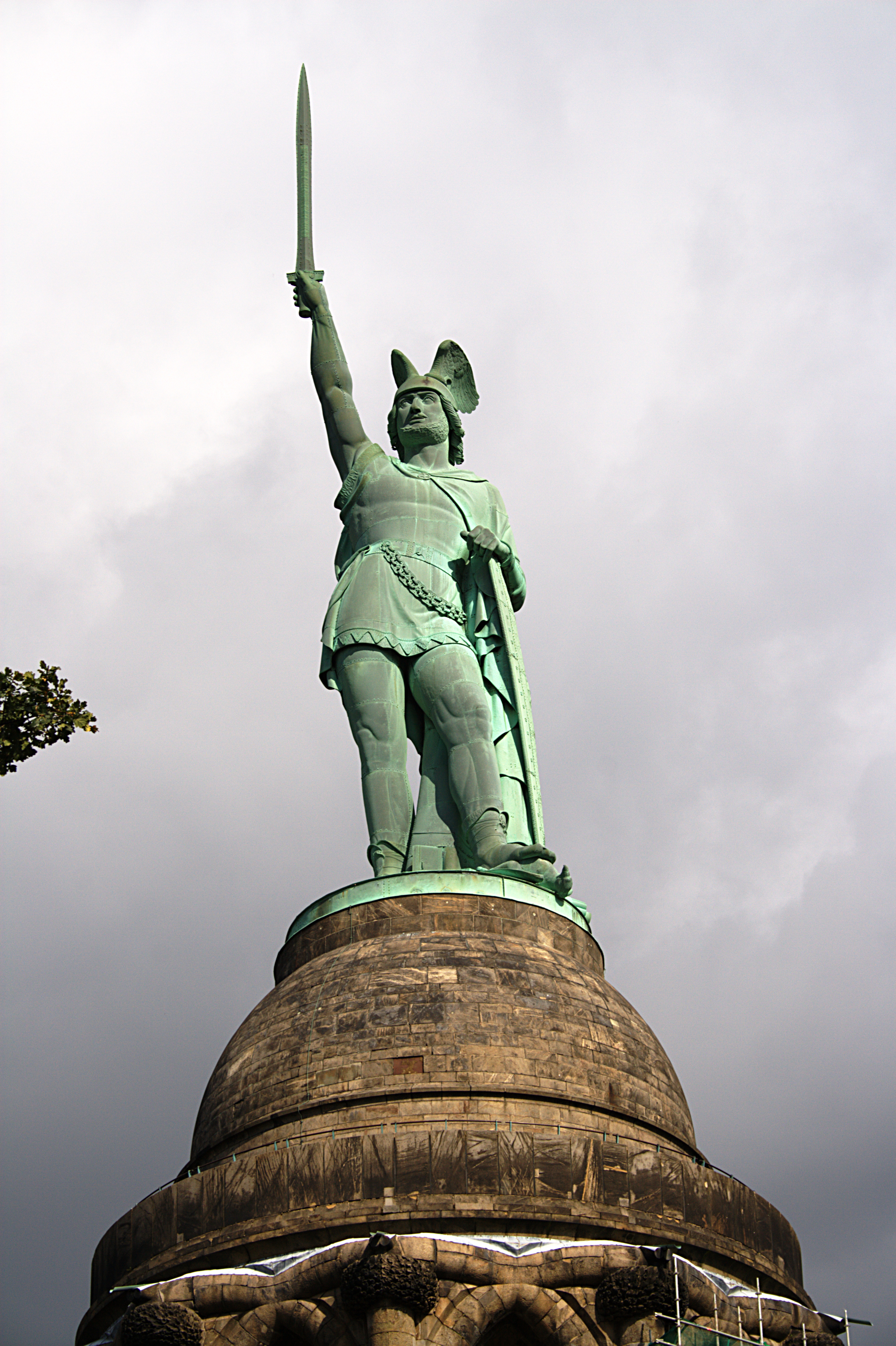 Hermannsdenkmal